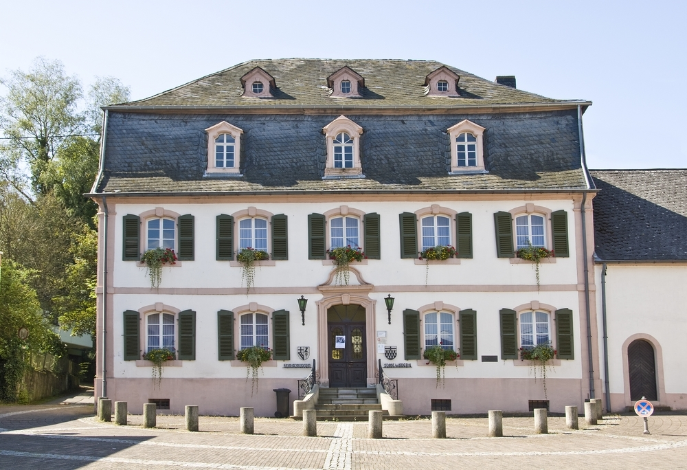 Öttinger Schlösschen in Wadern